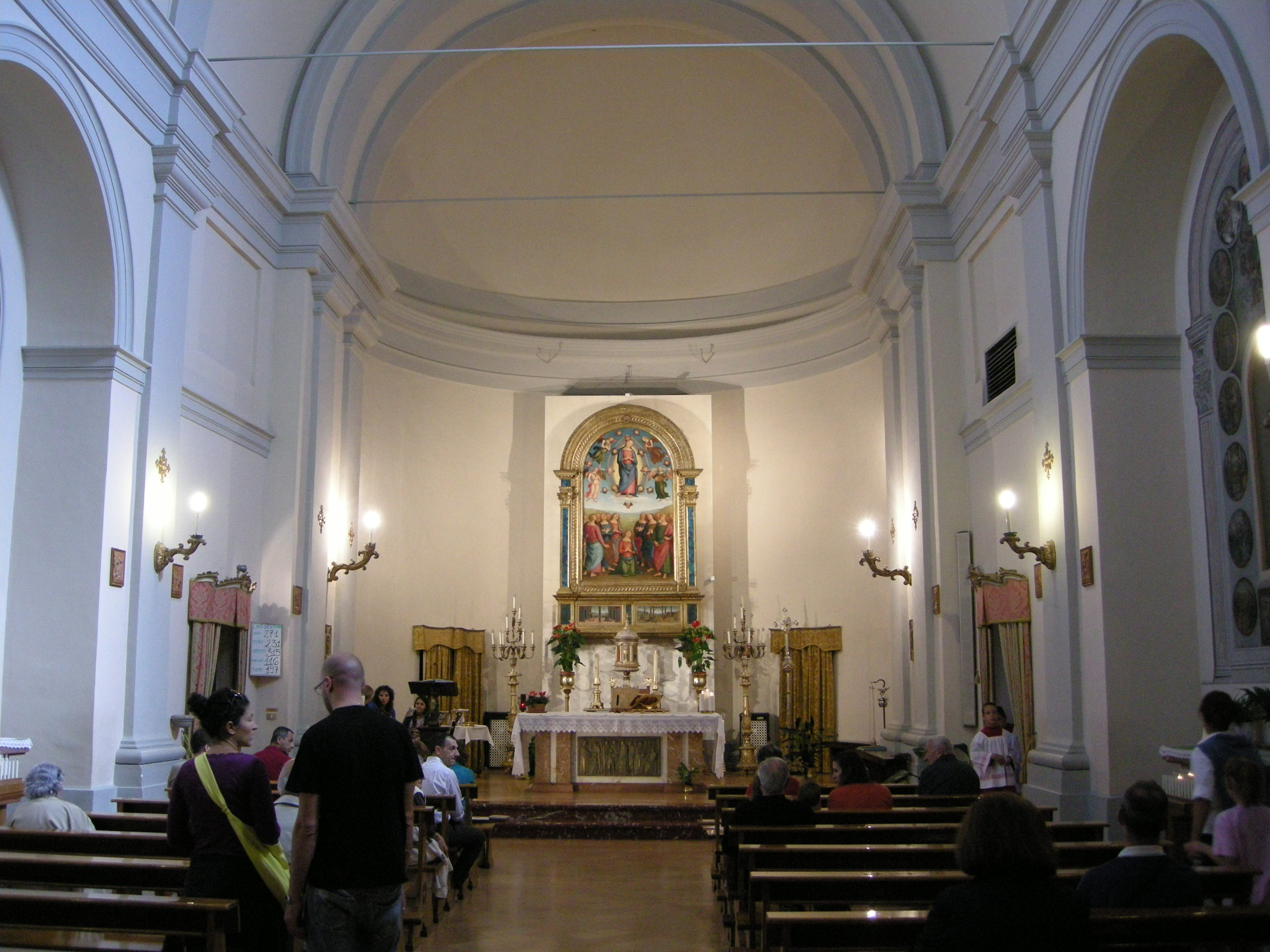 Corciano, santa maria